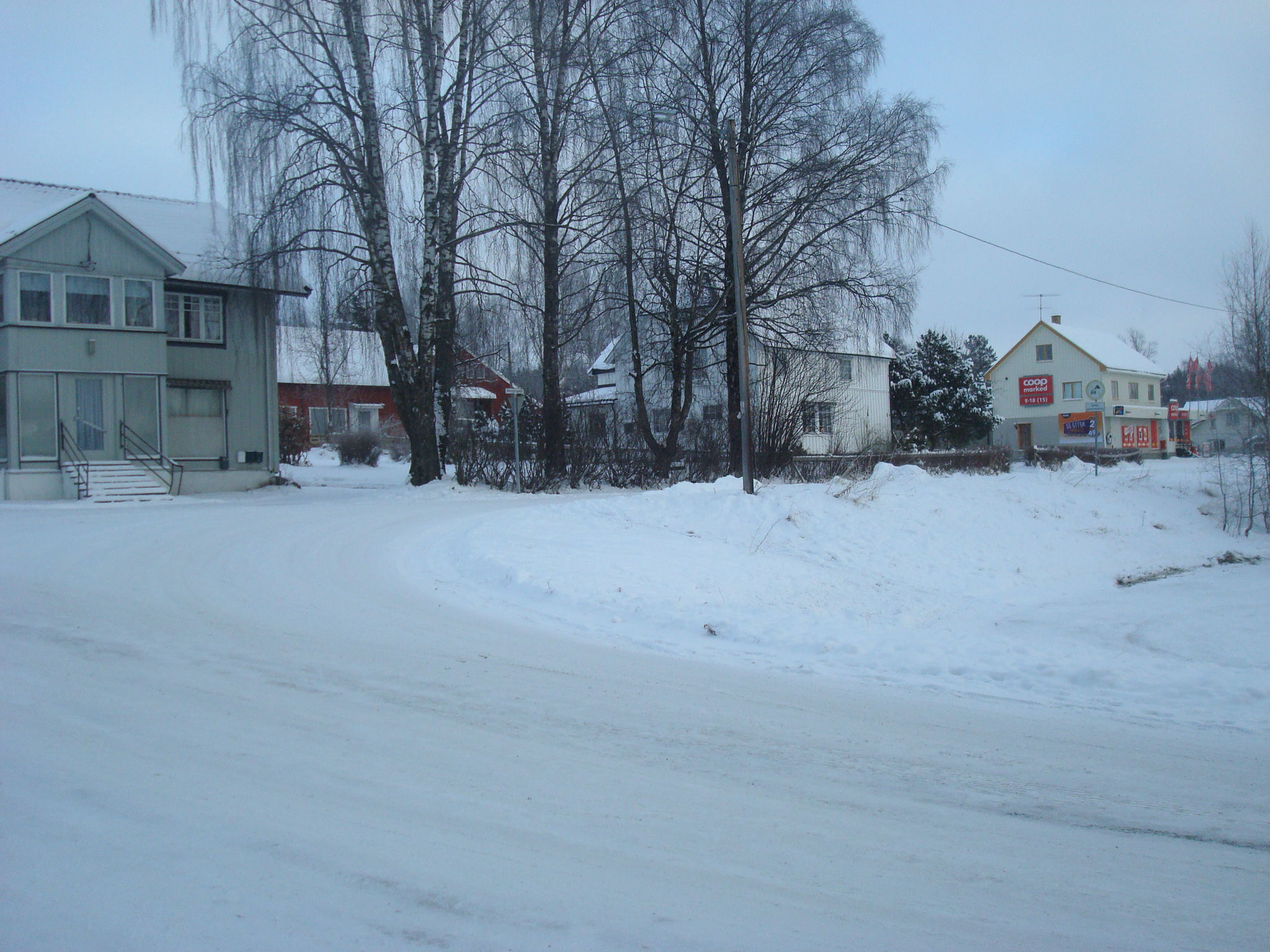 Fra Bøverbru i Vestre Toten desember 2012.